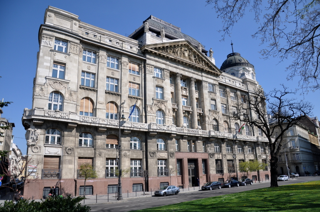 Ministry of Interior (Hungary)